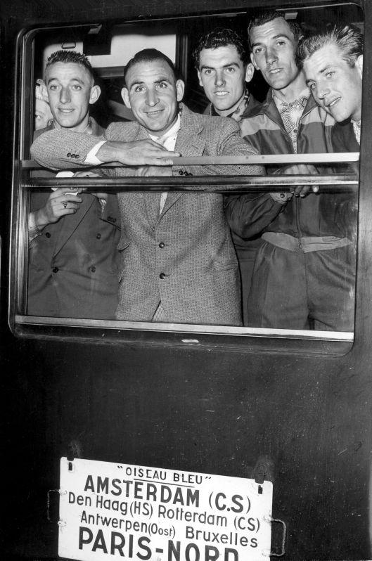 Spaarnestad Photo, SFA001013370 Nederlandse renners in de trein onderweg vanuit Roosendaal via Le Havre naar Parijs waar de Tour van start gaat, -v.l.n.r. Wout Wagtmans, Wim van Est, Adri Voorting, Gerrit Voorting en Daan de Groot. Nederland, Roosendaal, 5 juli 1955. Tour de France 1955. Collectie SPAARNESTAD PHOTO/NA/Anefo Dutch racing cyclists take the train to the start of the Tour in Paris. From the left to the right: Wout Wagtmans, Wim van Est, Adri Voorting, Gerrit Voorting en Daan de Groot. Roosendaal, 5 juli 1955. Tour de France 1928. Voor meer informatie en voor meer foto’s uit de collectie van Spaarnestad Photo, bezoek onze Beeldbank: U kunt ons helpen onze kennis van de fotocollecties te verrijken door tags en commentaren toe te voegen. Herkent u mensen of locaties of heeft u een bijzonder verhaal te vertellen bij één van de foto’s, laat dan een reactie achter (als u ingelogd bent bij Flickr) of stuur een mailtje naar: You can help us gain more knowledge on the content of our collection by simply adding a comment with information. If you do not wish to log in, you can write an e-mail to